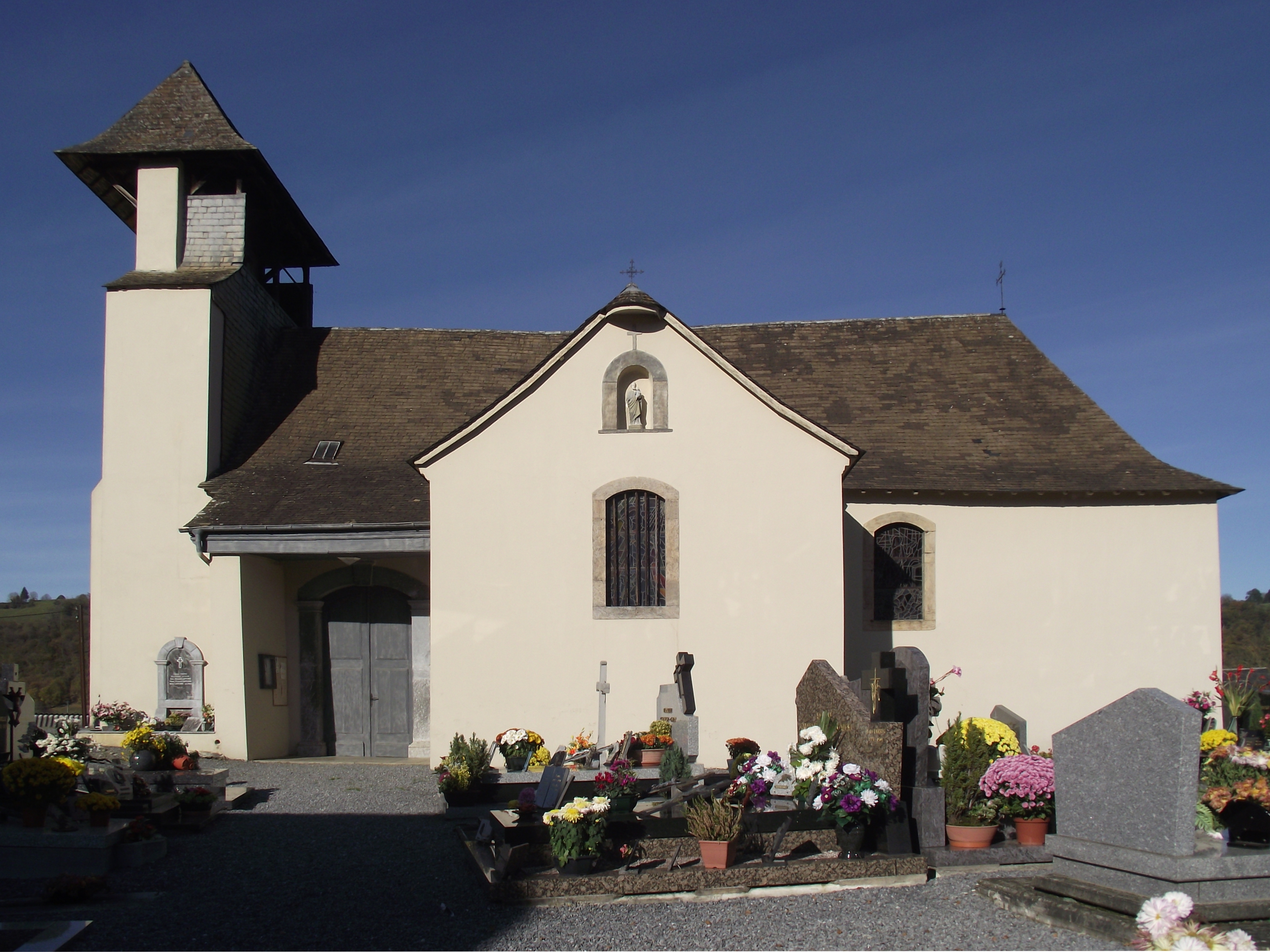 Église Saint-Caprais de Arcizac-ez-Angles (Hautes-Pyrénées, France)